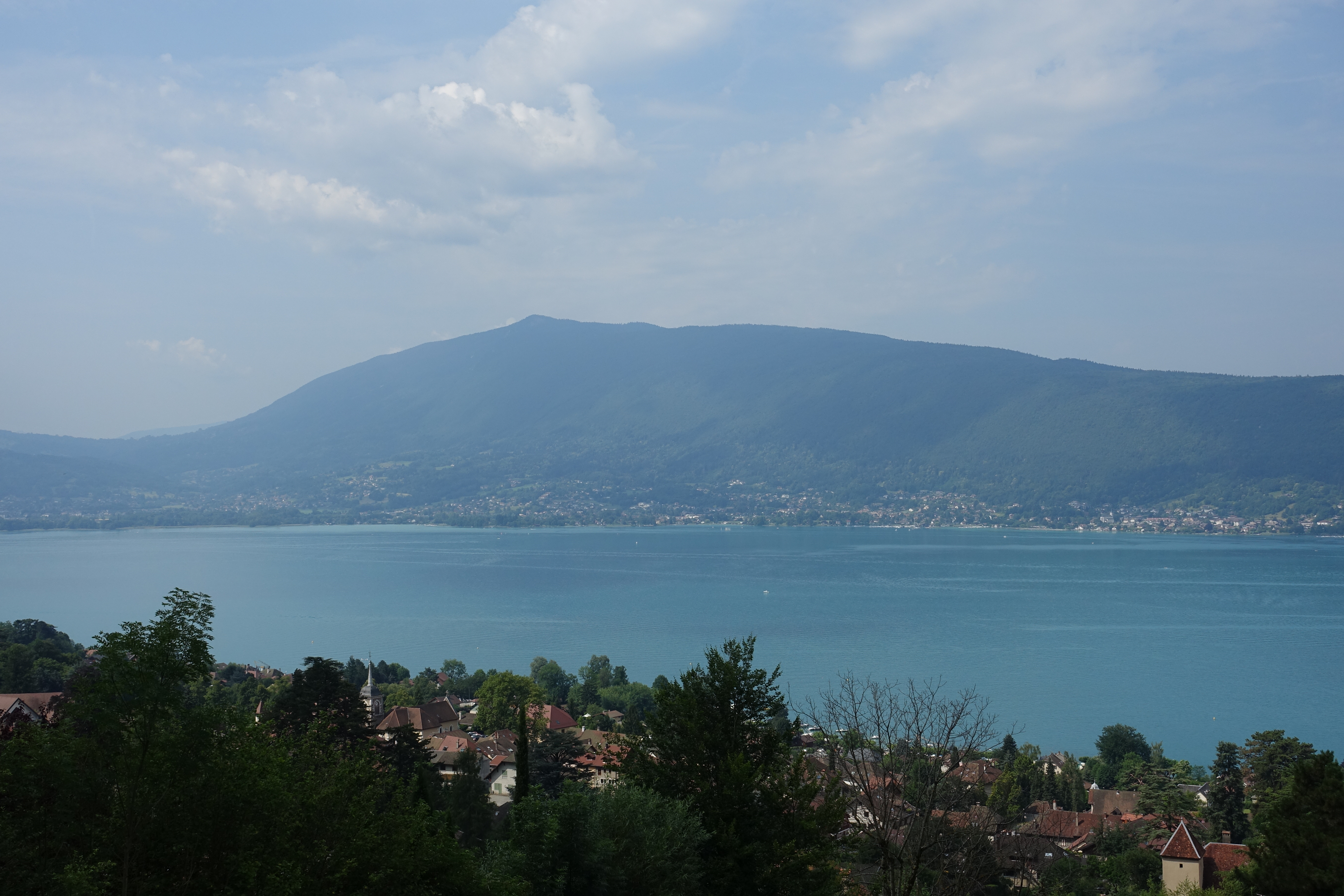 Semnoz @ Veyrier-du-Lac